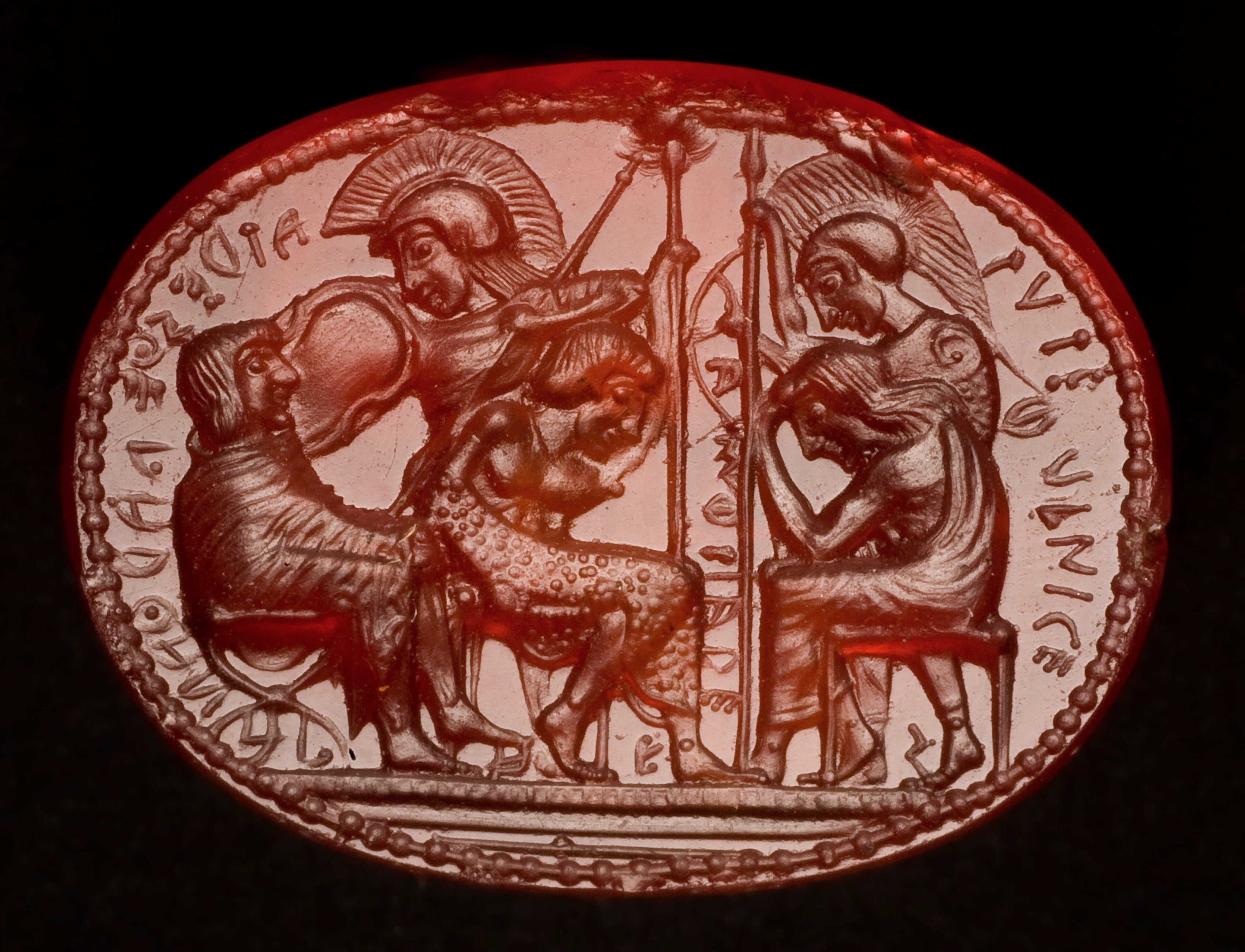 Etruskischer Skarabäus, sog. Stosch'scher Stein Siegelseite: Fünf Helden mit Namensbeischriften aus der Sage "Sieben gegen Theben" Standort: Antikensammlung, Staatliche Museen zu Berlin Fundort: Perugia (Italien) Material: Karneol Maße: Länge 1,6 cm; Breite 1,2 cm; Dicke 0,2 – 0,5 cm